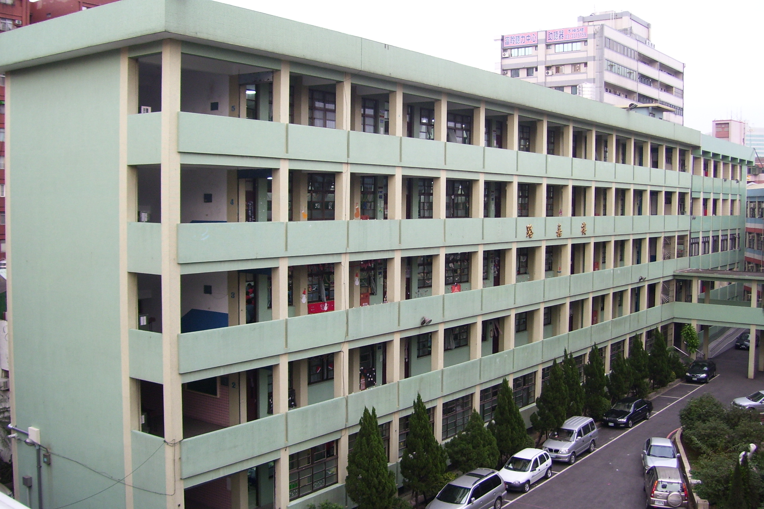 振聲中學。